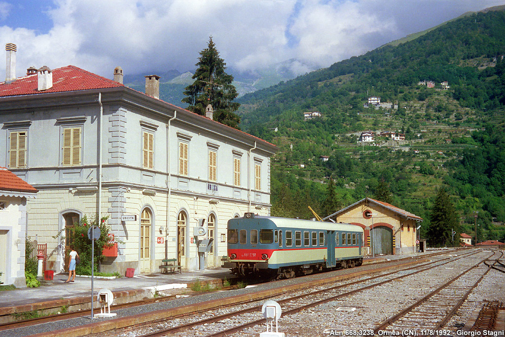 Stazione ferroviaria di Ormea, in sosta l'automotrice ALn 668.3238.